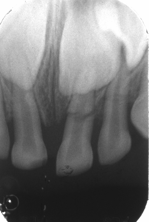 fracture radiculaire dent temporaire